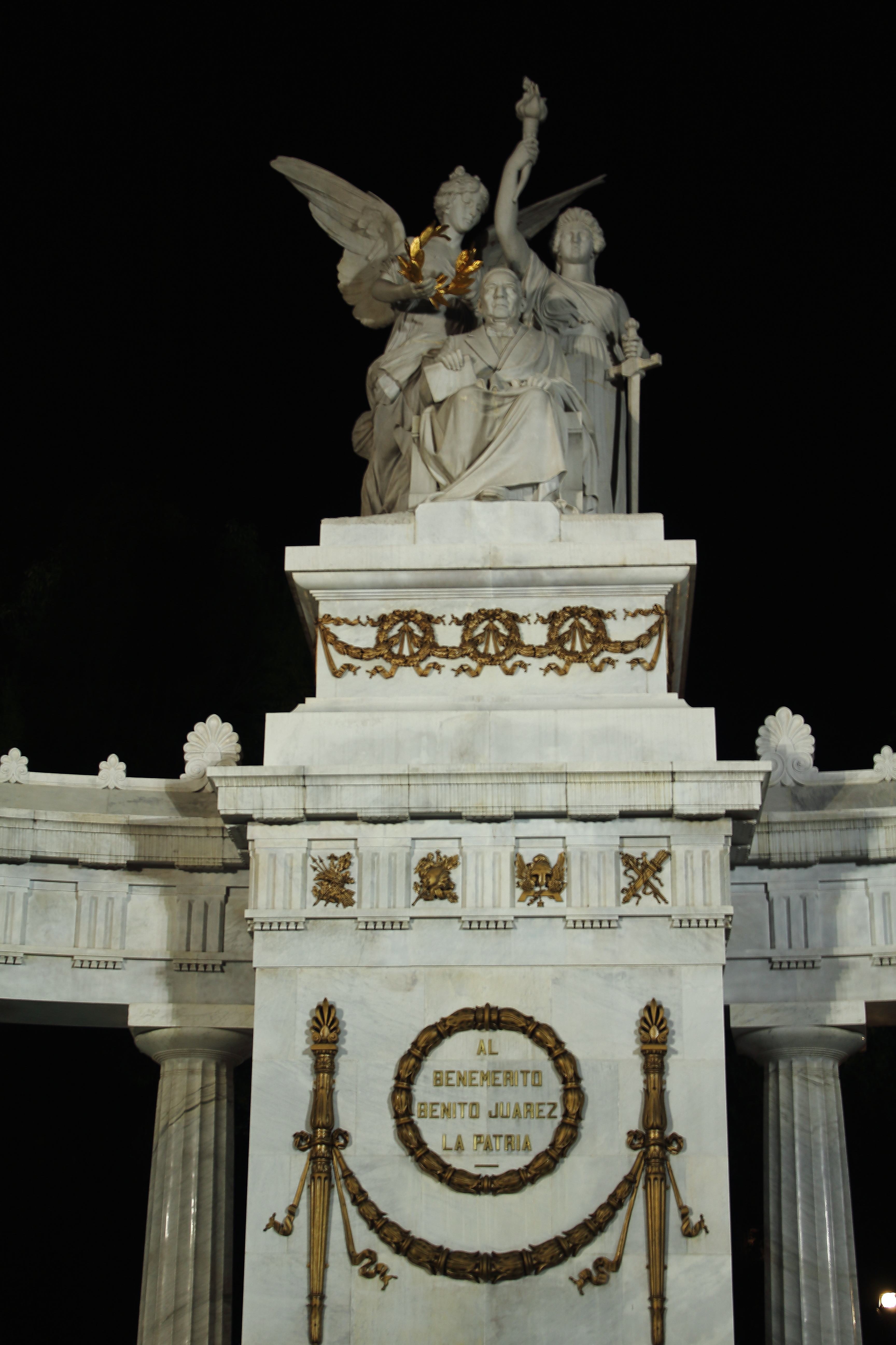 Hemiciclo a Juárez en la Ciudad de México